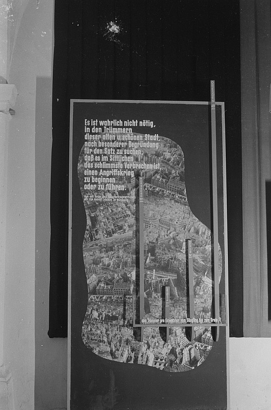 Original image description from the Deutsche Fotothek Propagandaplakat zur Zerstörung Dresdens